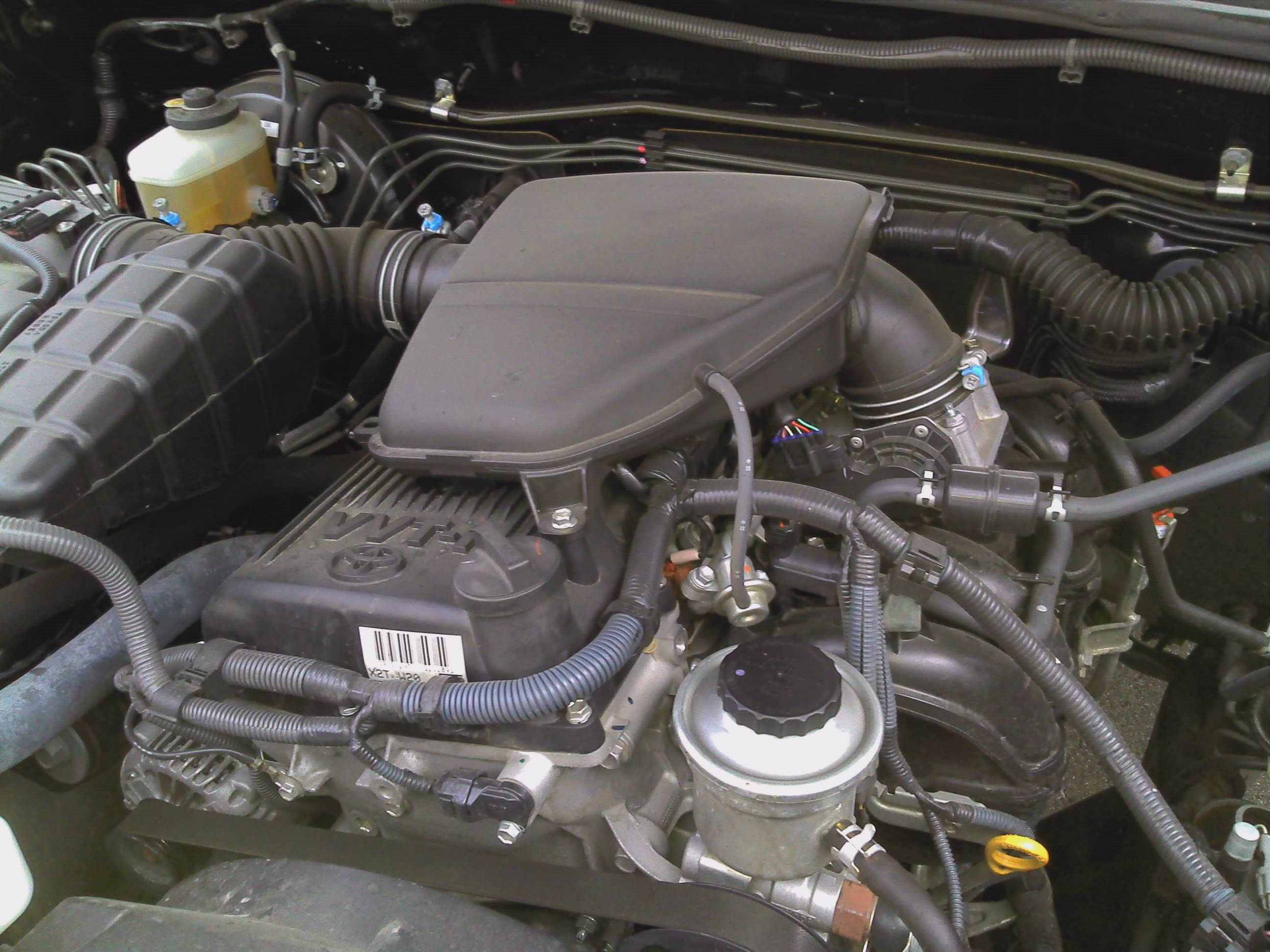 トヨタ・2TR-FE型エンジン